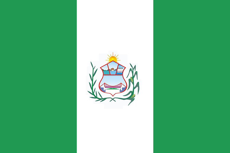 Bandera de la provincia de Picota del departamento de San Martín